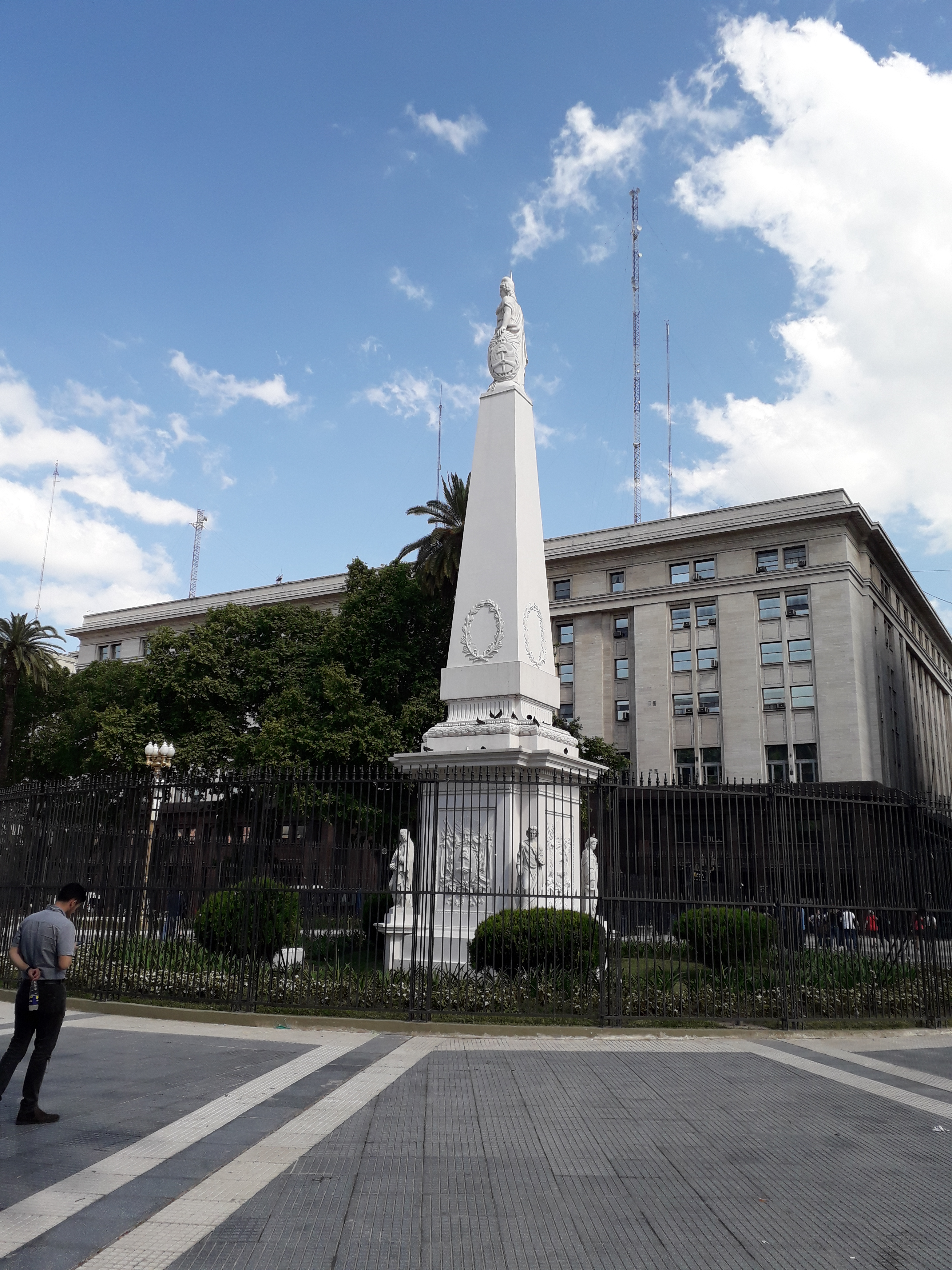 Pirámide de Mayo, Plaza de Mayo, Buenos Aires, Argentina